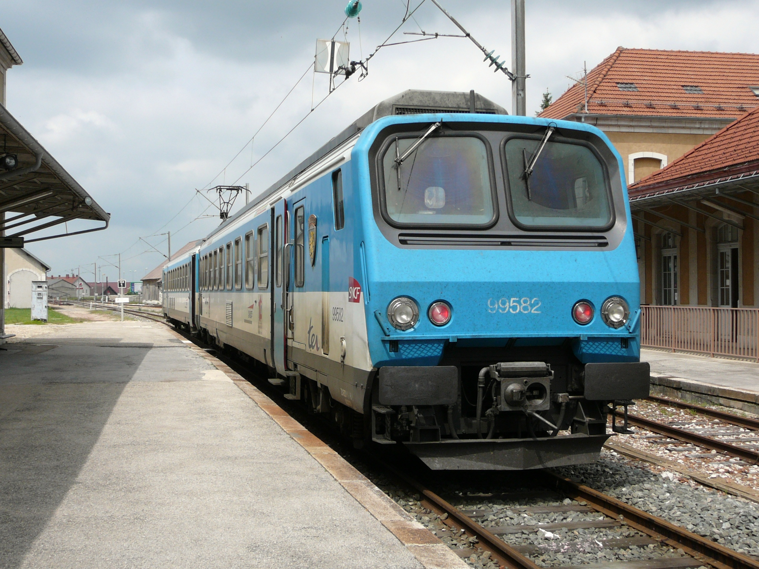 Z2 et section de séparation. La pancarte levez panto accrochée à la caténaire matérialise le changement de tension.